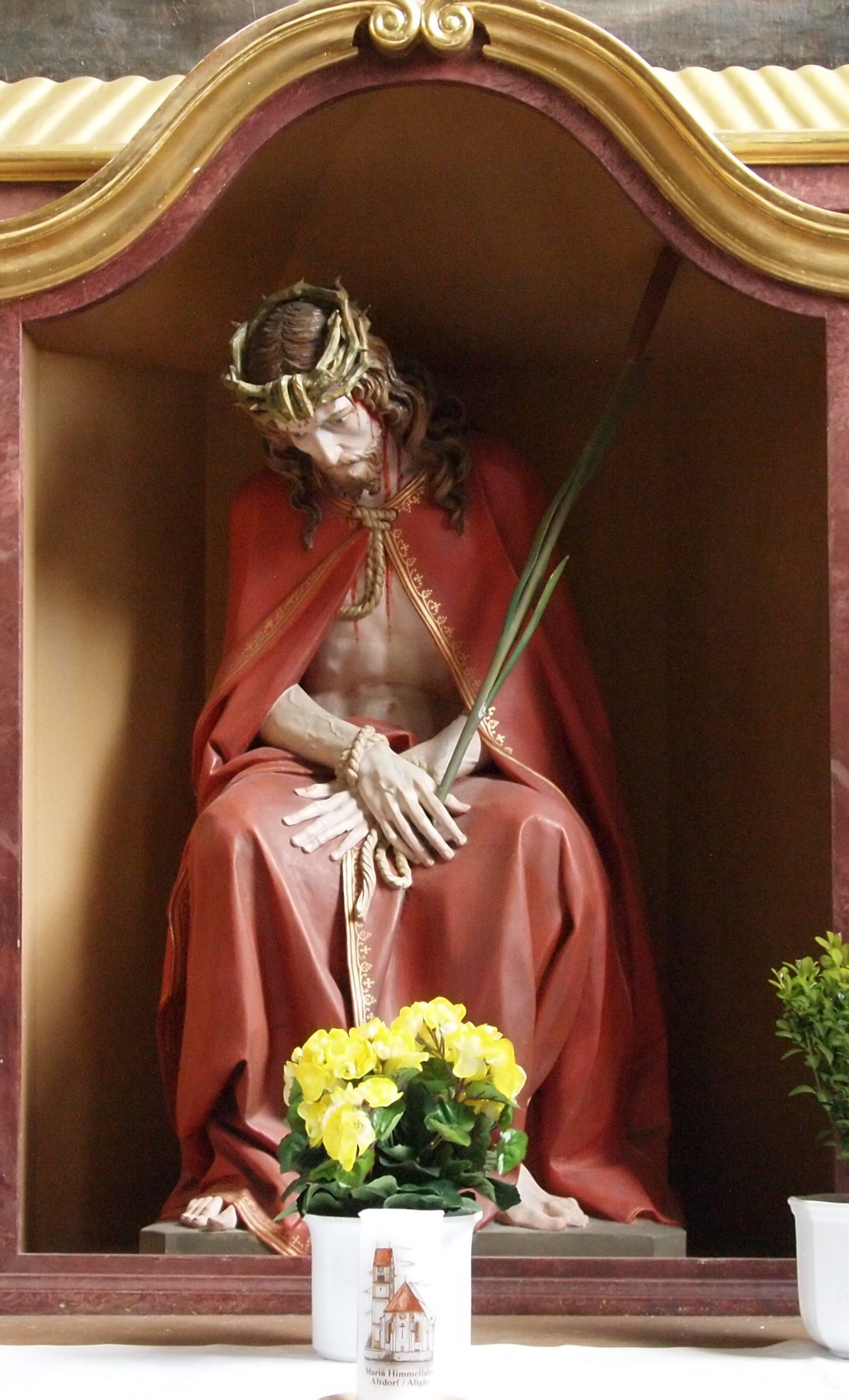 Hörmannshofen (Biessenhofen), Wallfahrtskirche St. Ottilia, neubarocke Darstellung "Jesu nach seiner Geißelung als König der Juden" (1885/90)